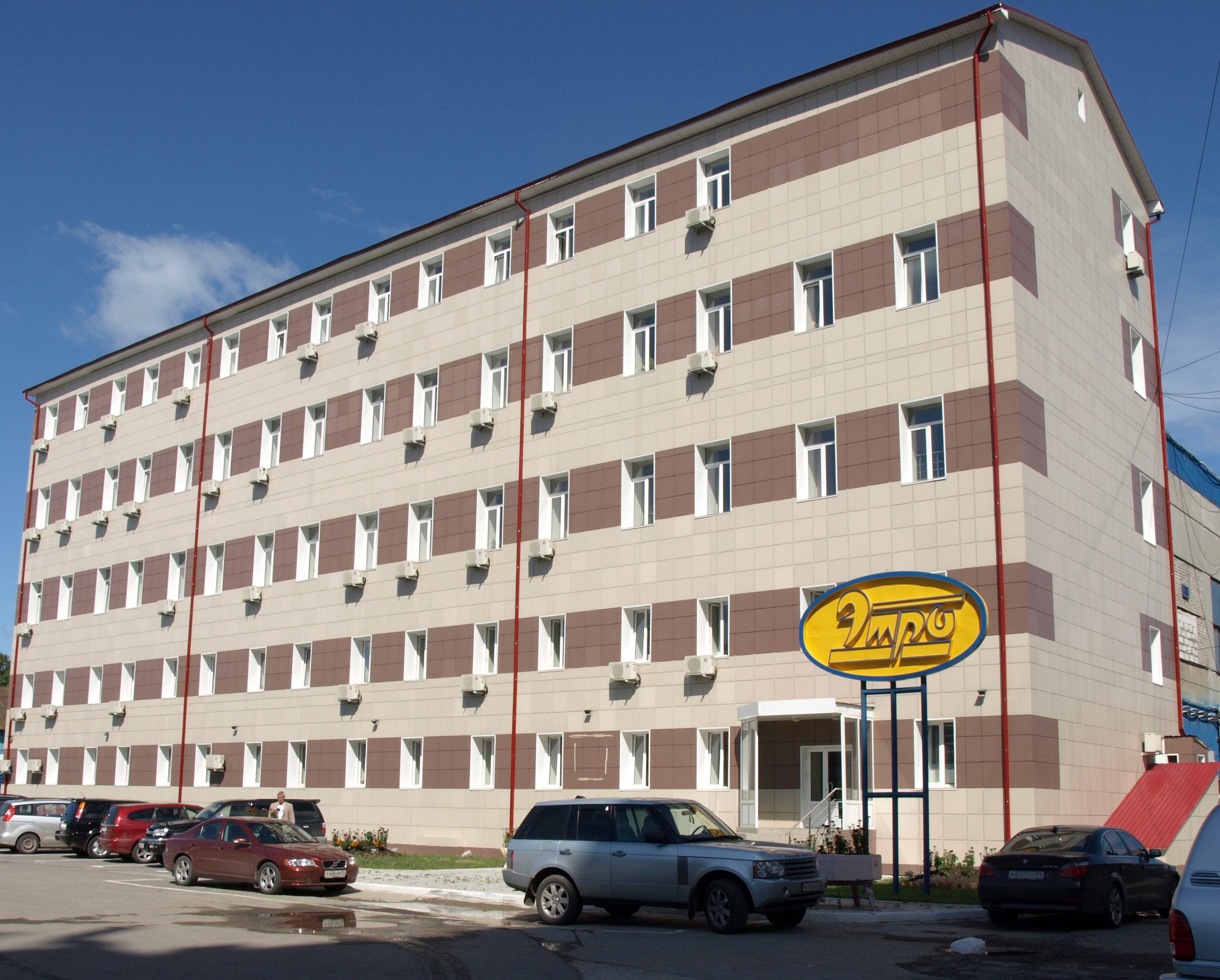 Административное здание завода "Электроагрегат"